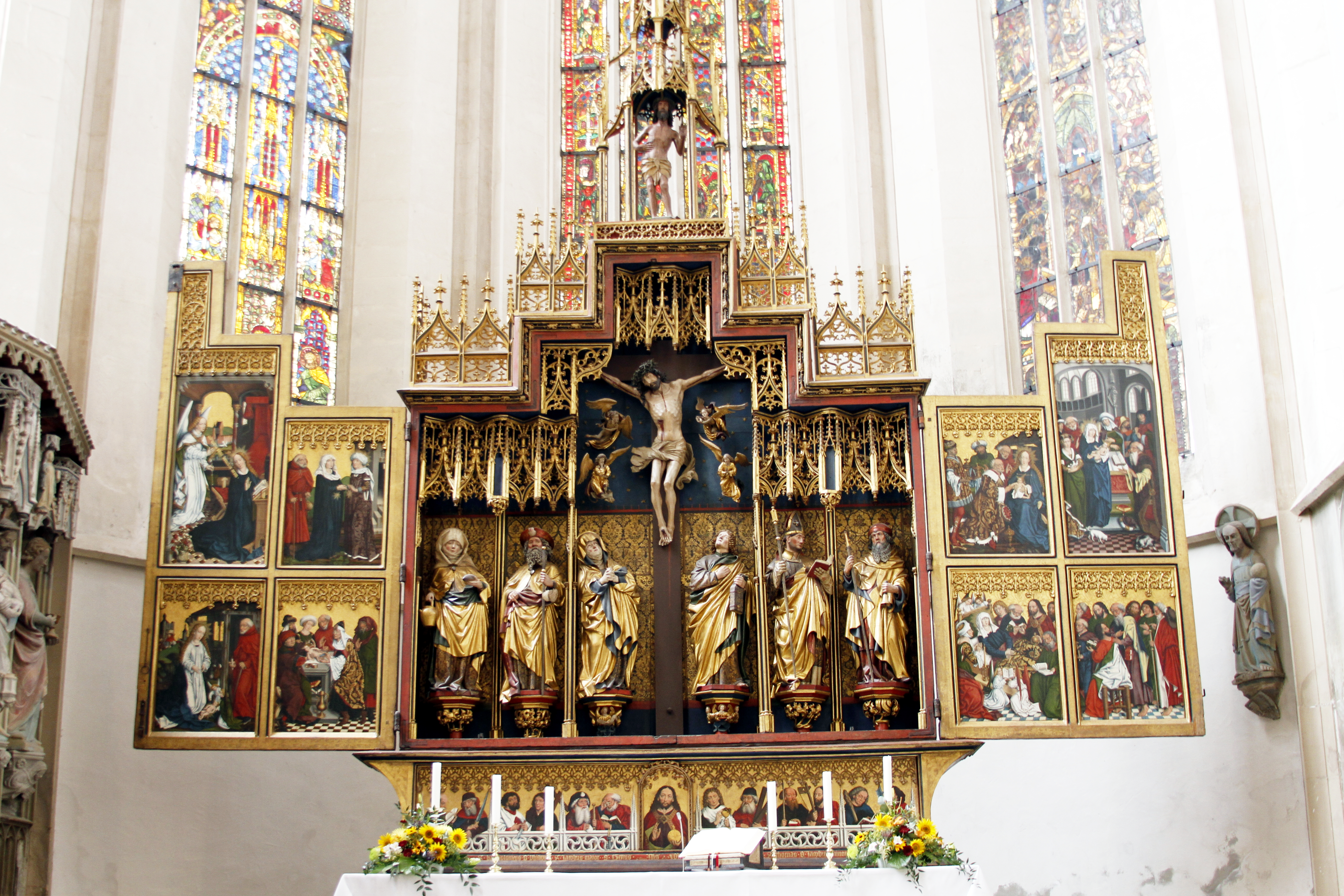 St.Jakob - Rothenburg ob der Tauber - Germany